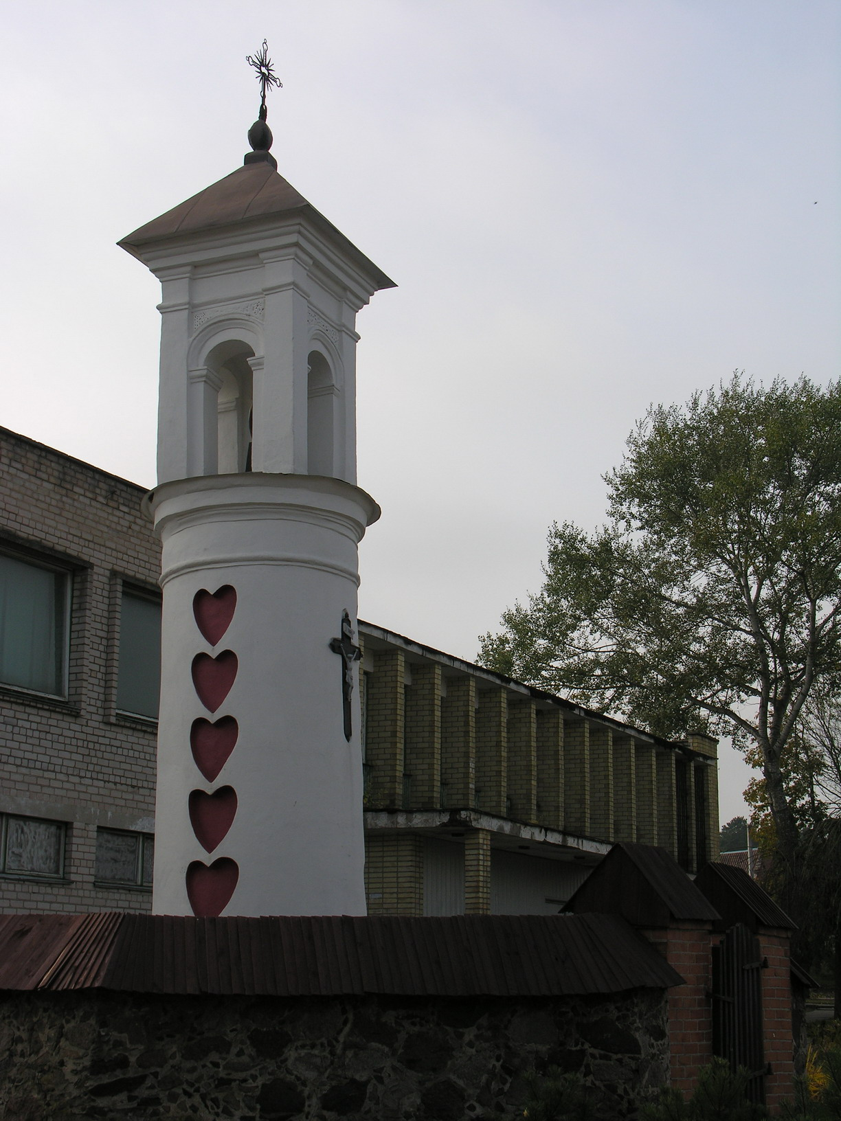 Penkių širdžių koplytstulpis Tirkšliuose, Mažeikių raj. (past. XVII a. pab.) Foto: Algirdas, 2005 m. spalio 21 d.